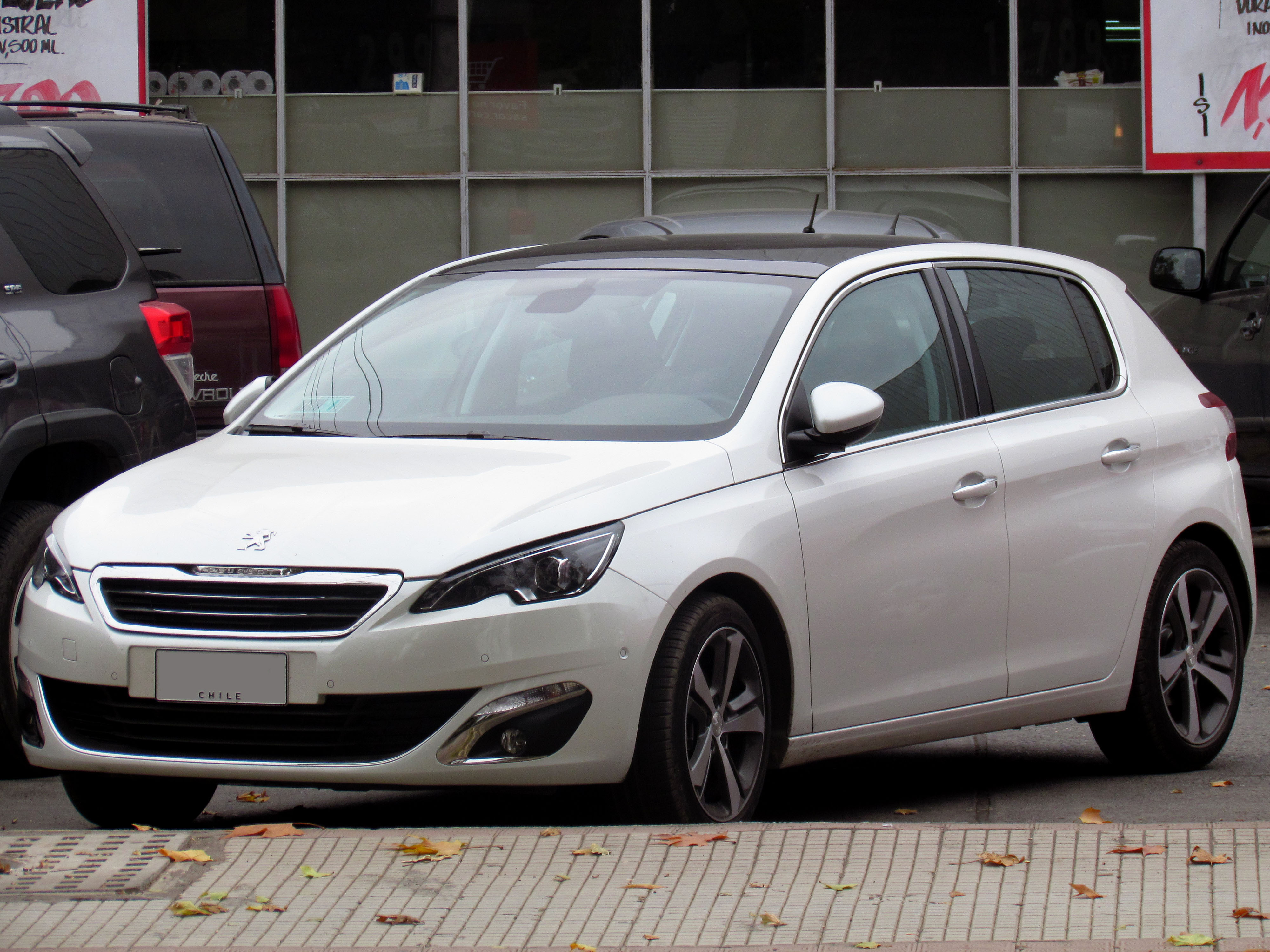 Peugeot 308 1.6 e-HDi Feline 2014